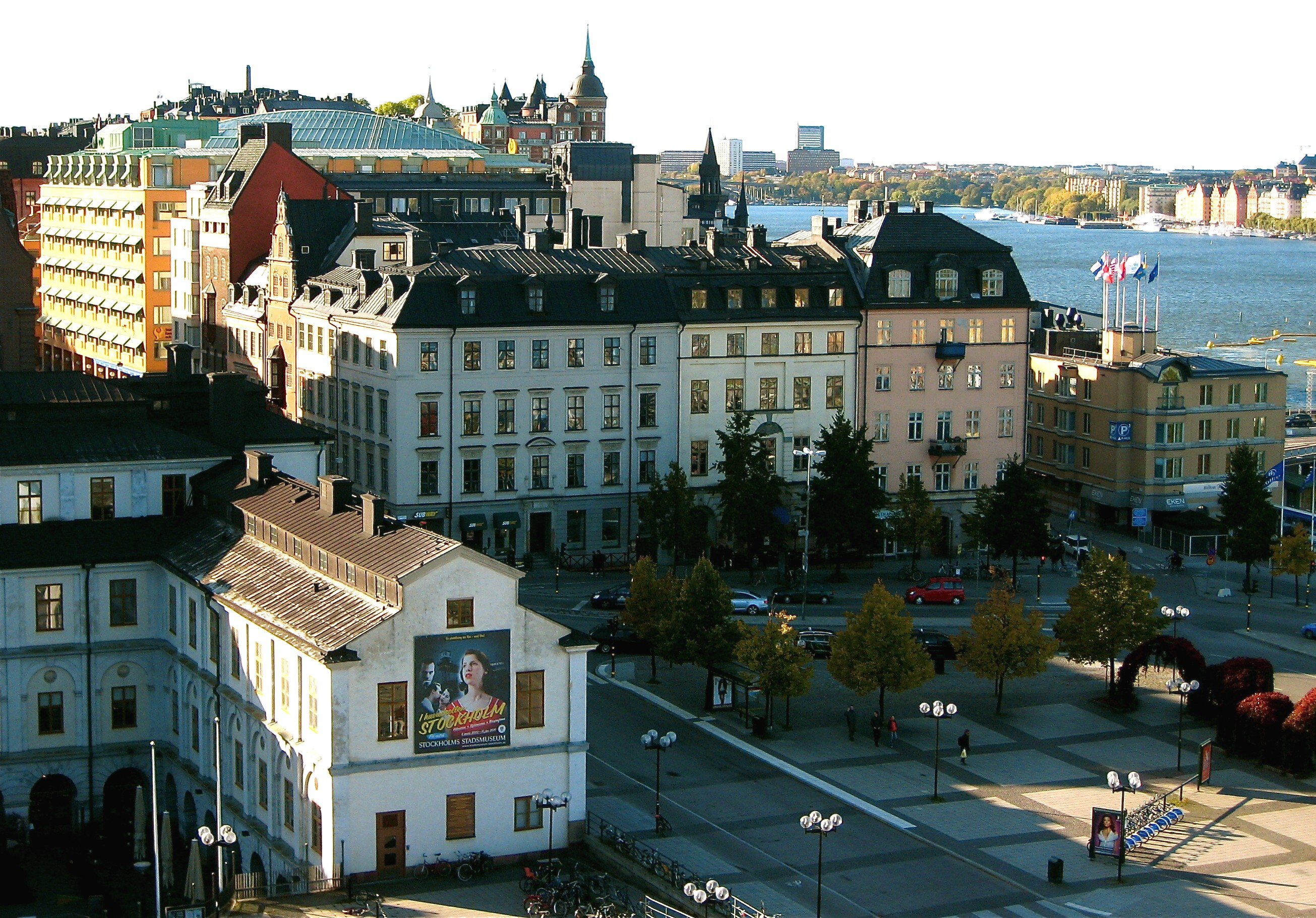 Kvarteret Överkikaren och omgivningar vid Slussen sedda från Katarinahissen.